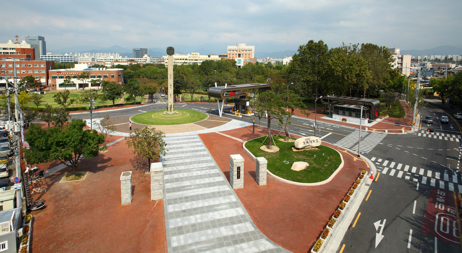 경북대학교 정문사진입니다.